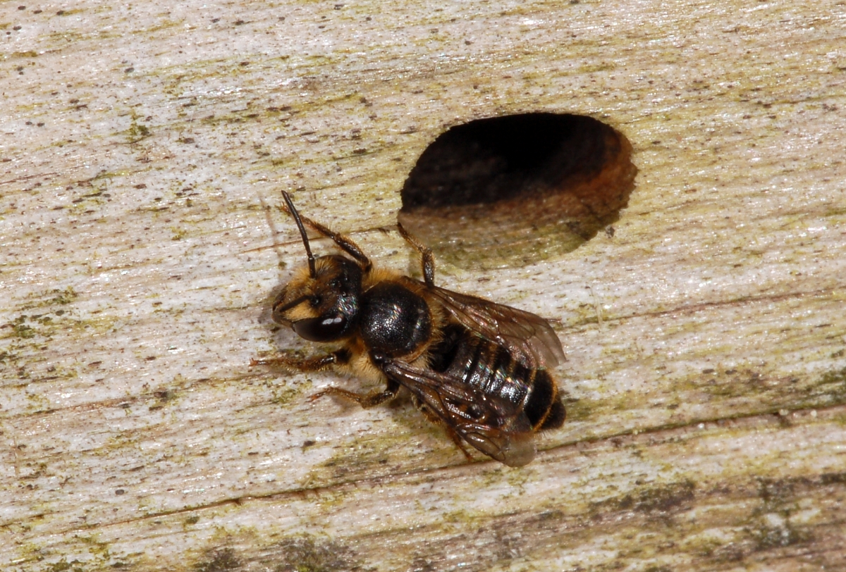 Megachile centuncularis, Pfungstädter Düne, Pfungstadt, Hessen, Deutschland